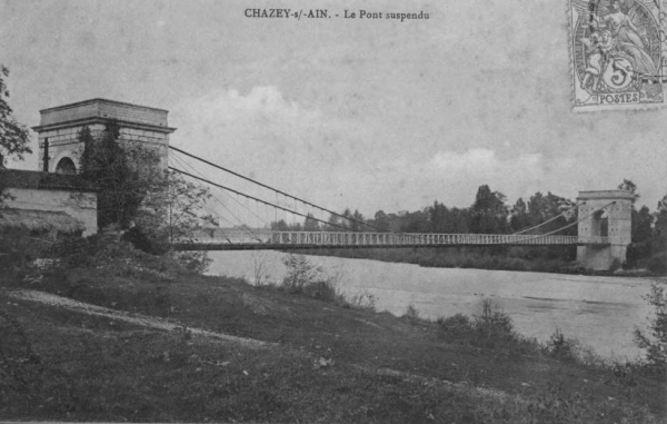 Pont supendu de Chazey : construit en 1829, détruit en 1944 au cours de la bataille de Meximieux.